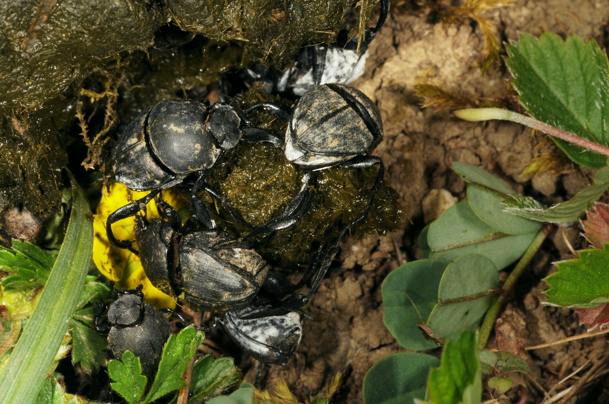 Sisyphus schaefferi an Schafskot, Steinau bei Schlüchtern, Main-Kinzig-Kreis, Hessen, Deutschland